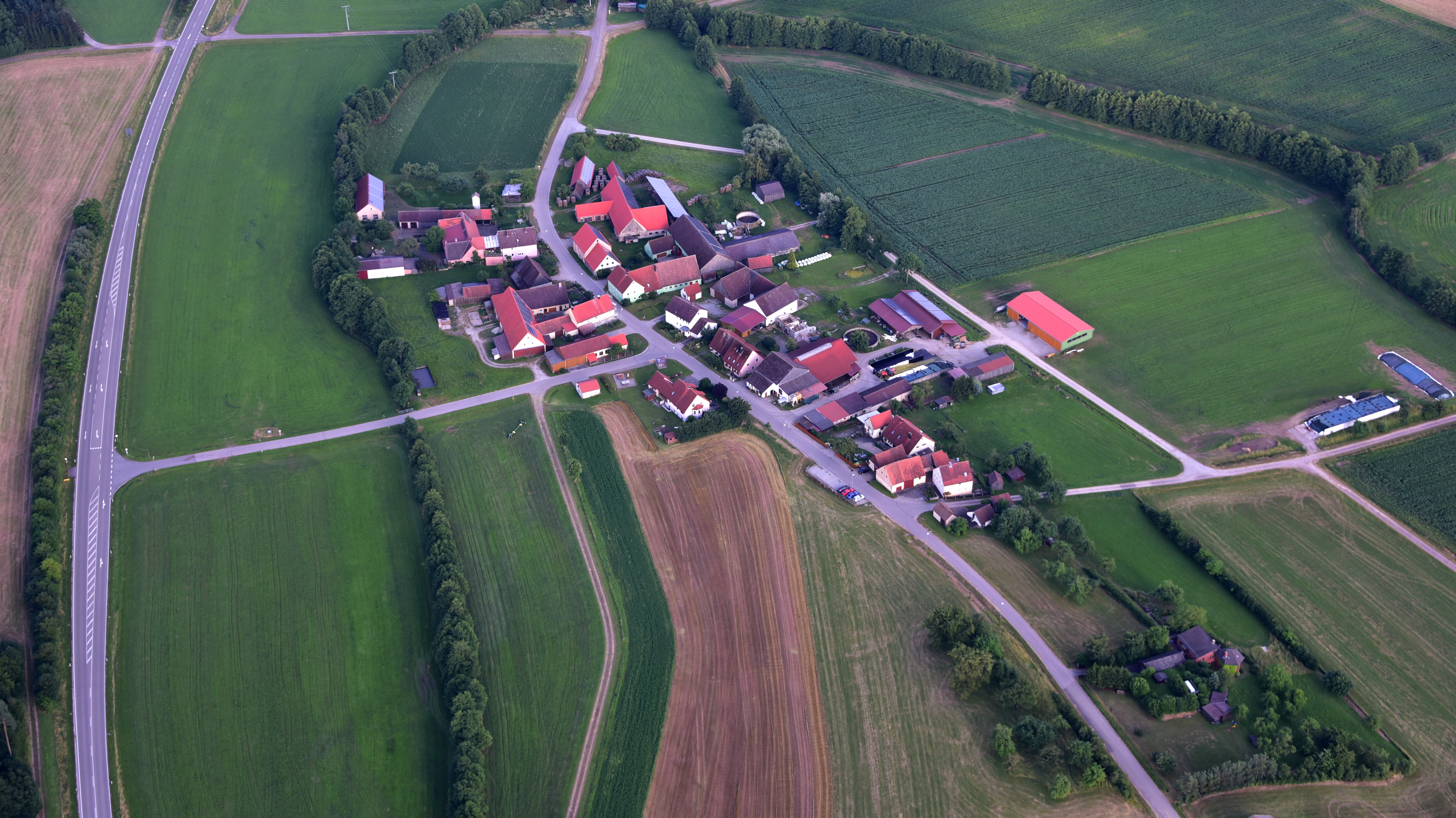 Steinach am Wald, Luftaufnahme (2016)